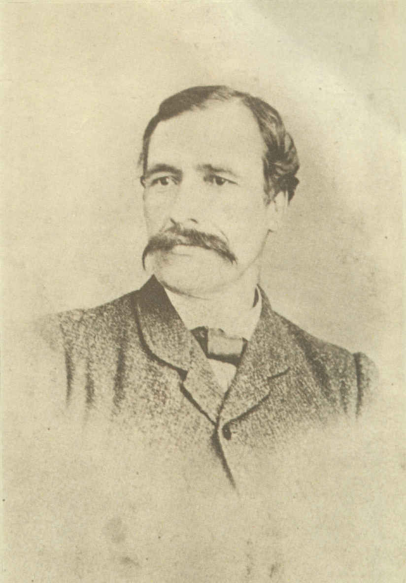 Georgi Sava Rakovski (1821 - 1867) - Bulgarian revolutioner, Georgi Rakowski, Георги Раковски